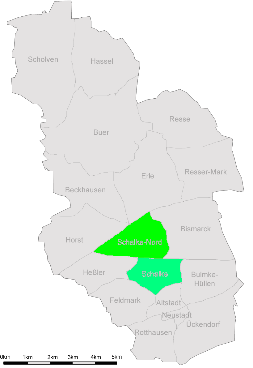 Beschreibung: Von Marc Schuelper erstelle Karte von Gelsenkirchen mit den 18 Stadtteilen. Stadtteil Beckhausen markiert. Description: By Marc Schuelper provided map of Gelsenkirchen with its 18 quarters. Highlighted quarter Beckhausen.